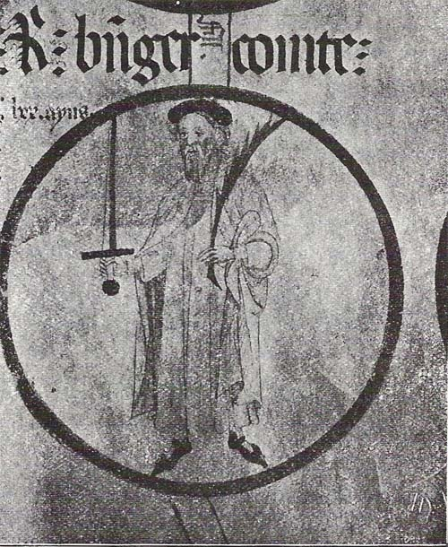 Rotlle genealògic del Monestir de Poblet